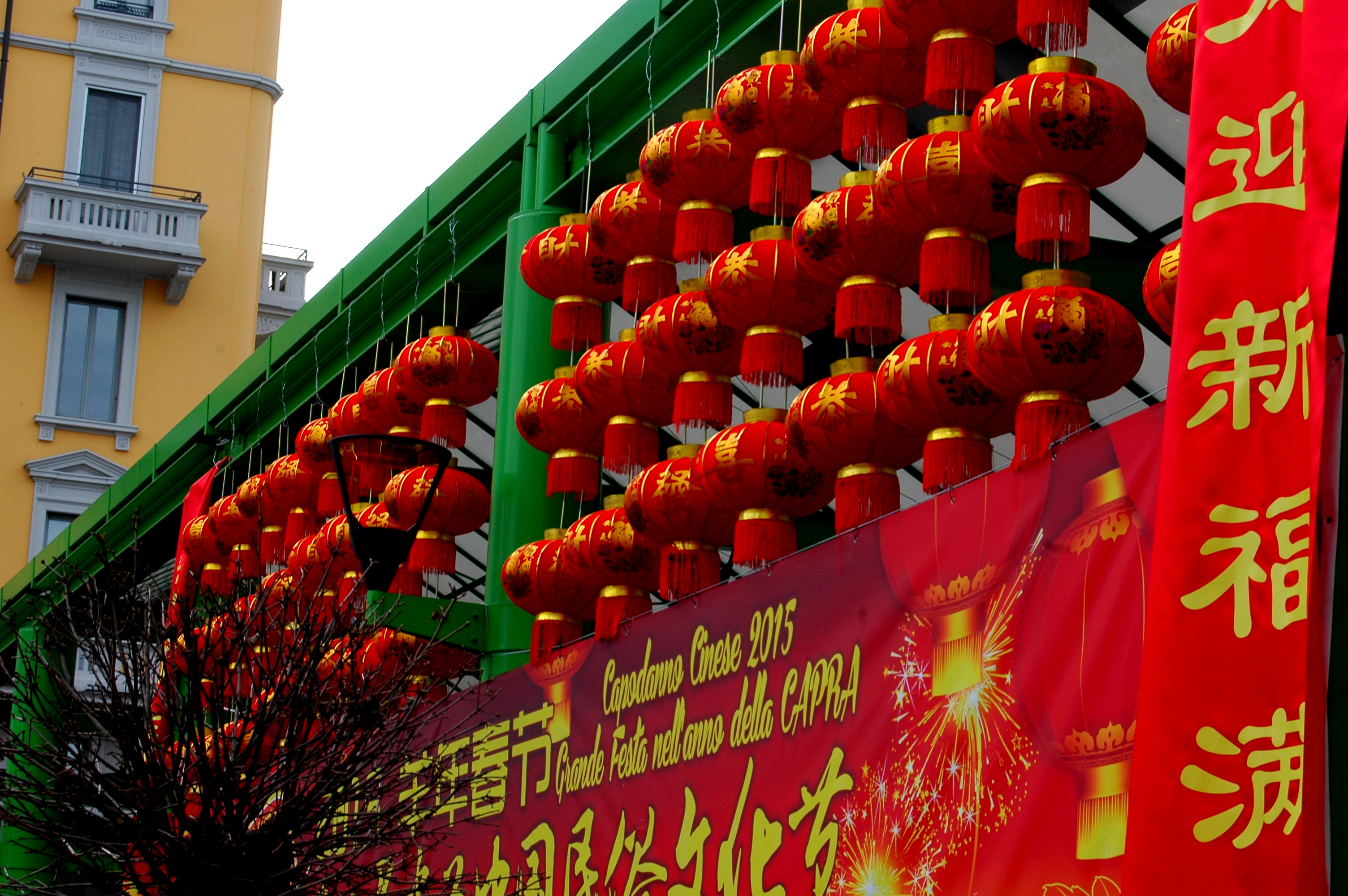 Chinatown Milano, Capodanno Cinese